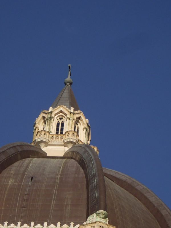 Cerignola, croce del Duomo Tonti (Basilica di San Pietro Apostolo).